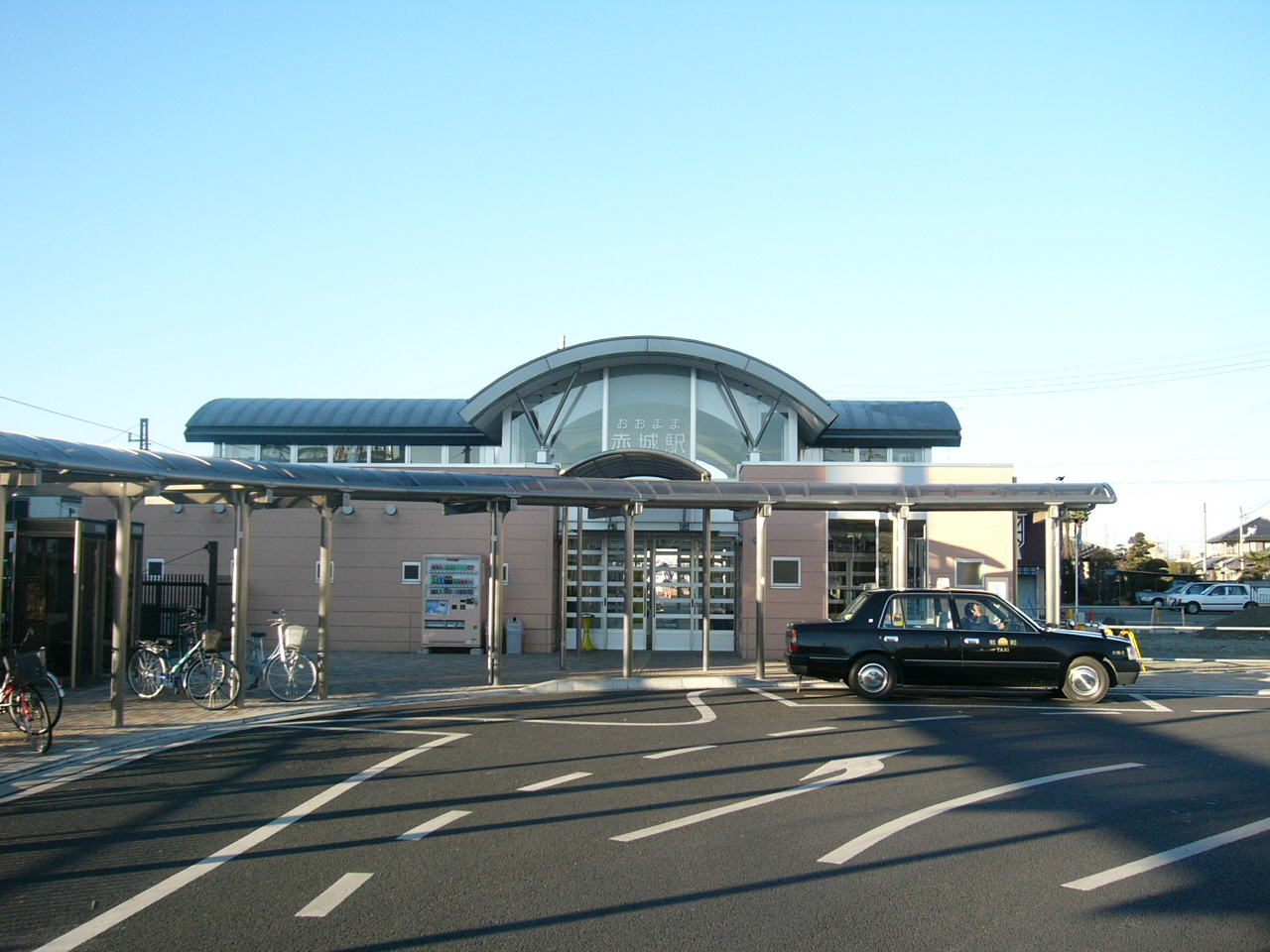 Akagi Station